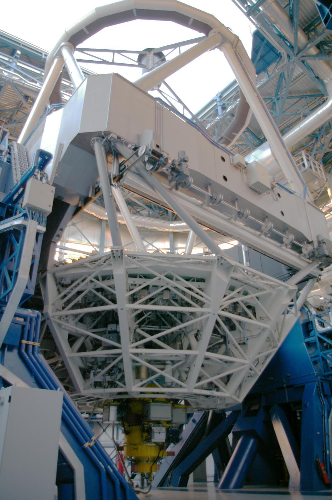 Paranal Observatorium, UT2